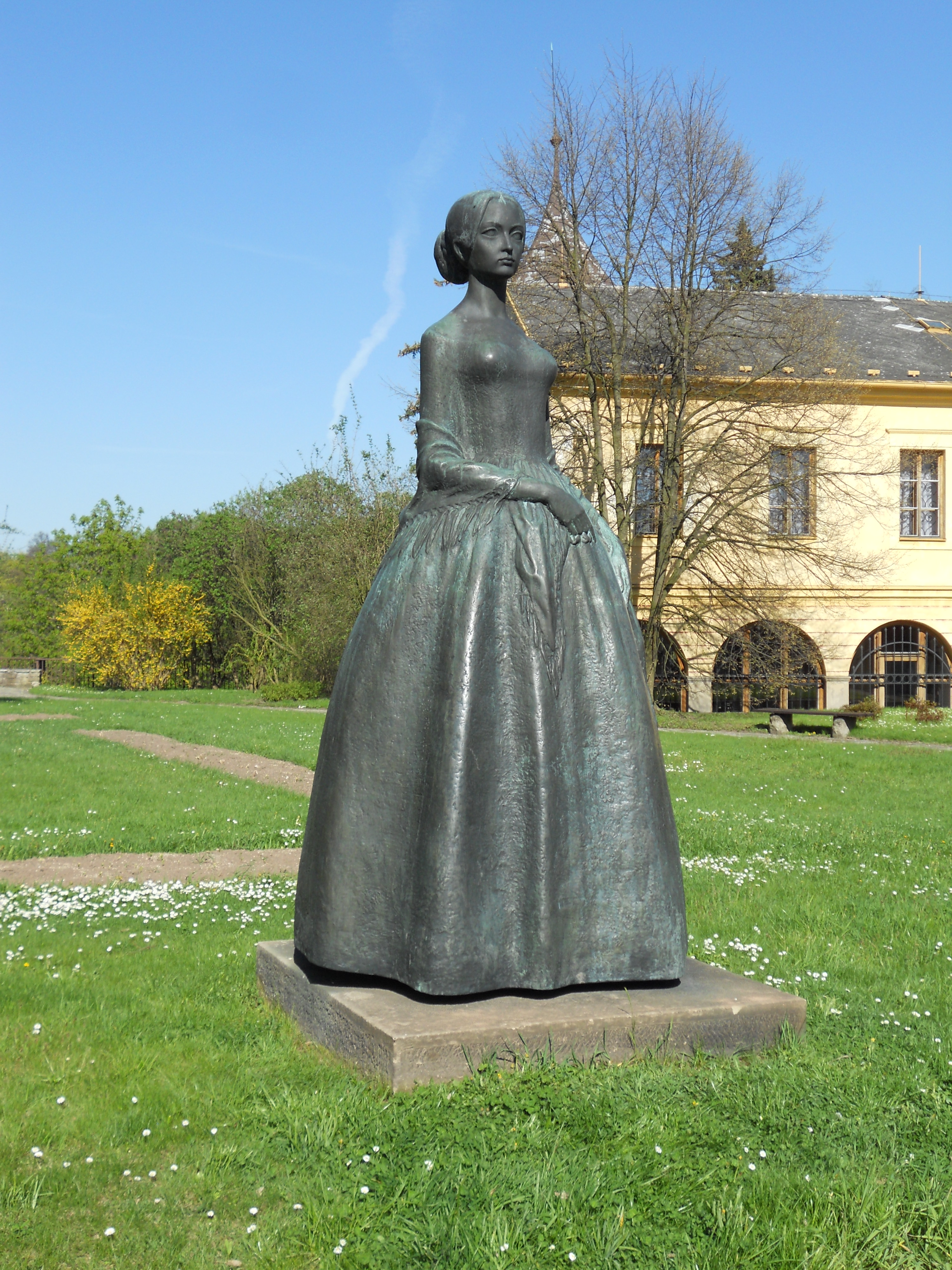 Pomník Barunky Panklové (Boženy Němcové) u muzea v České Skalici